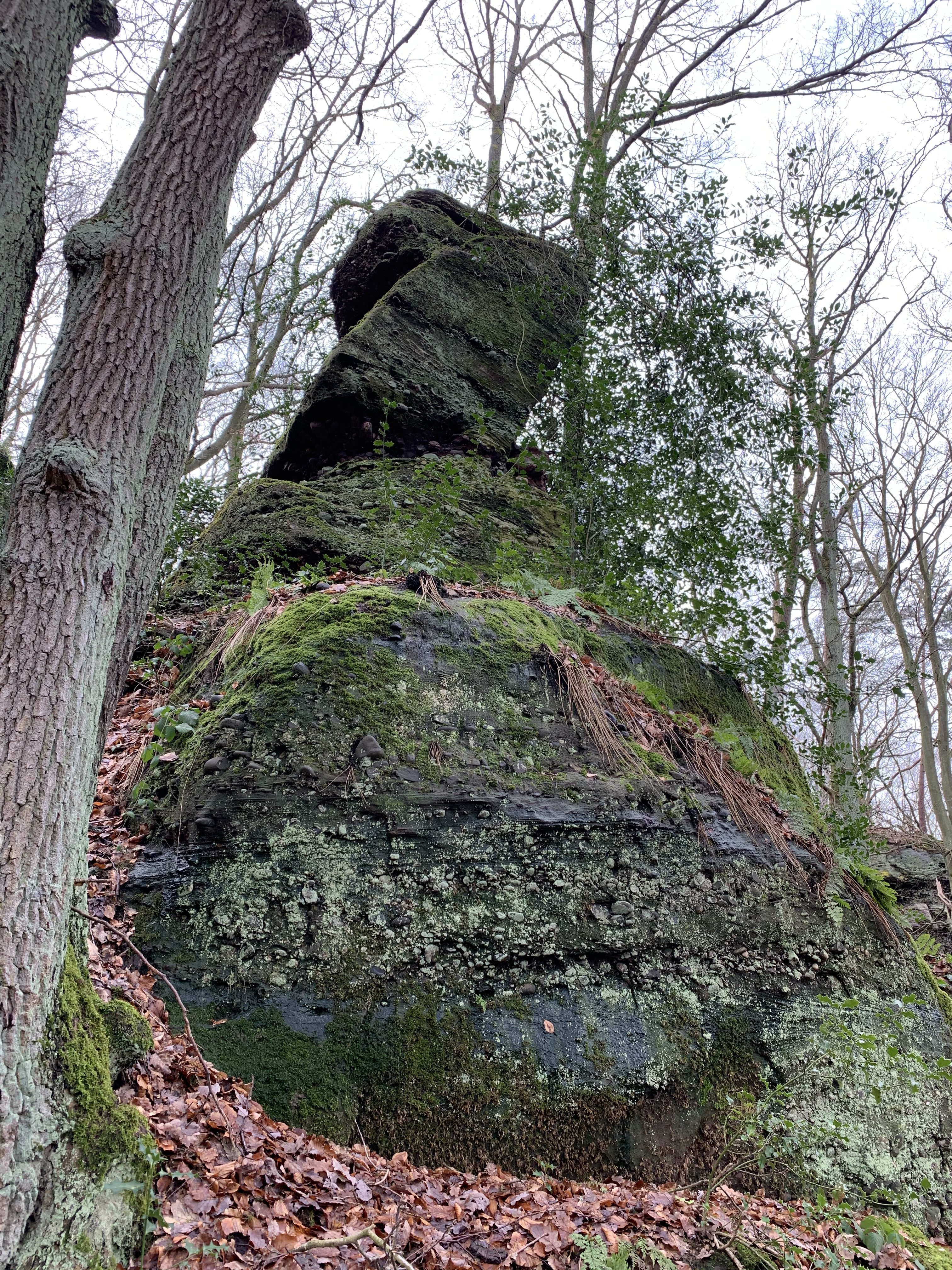 NSG Buntsandsteinfelsen im Rurtal von Untermaubach bis Abenden bei Nideggen, Nordrhein-Westfalen